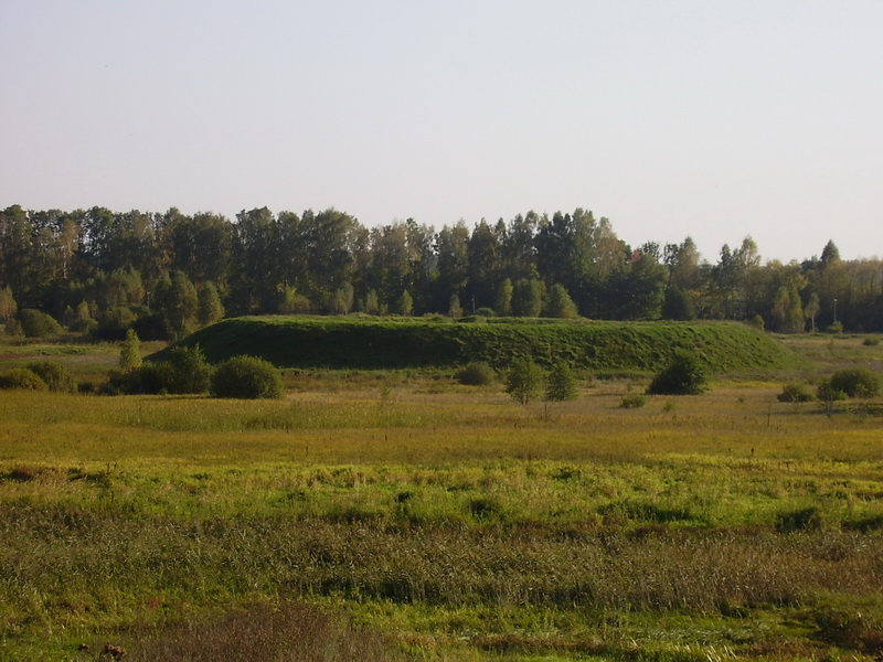 Мсцібава. Замчышча